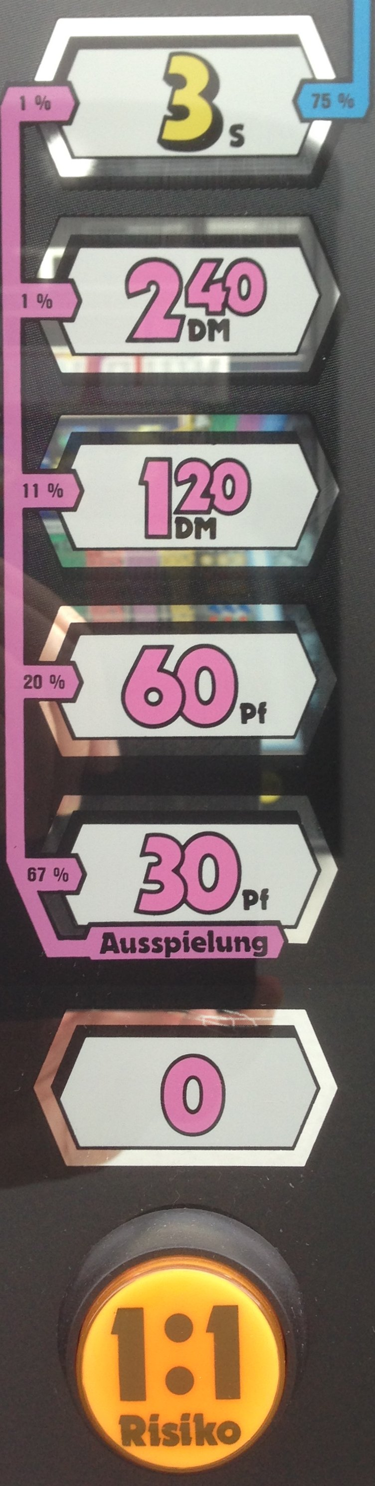 Unterer Teil einer Risikoleiter eines Geldspielgerätes aus den 1990er-Jahren